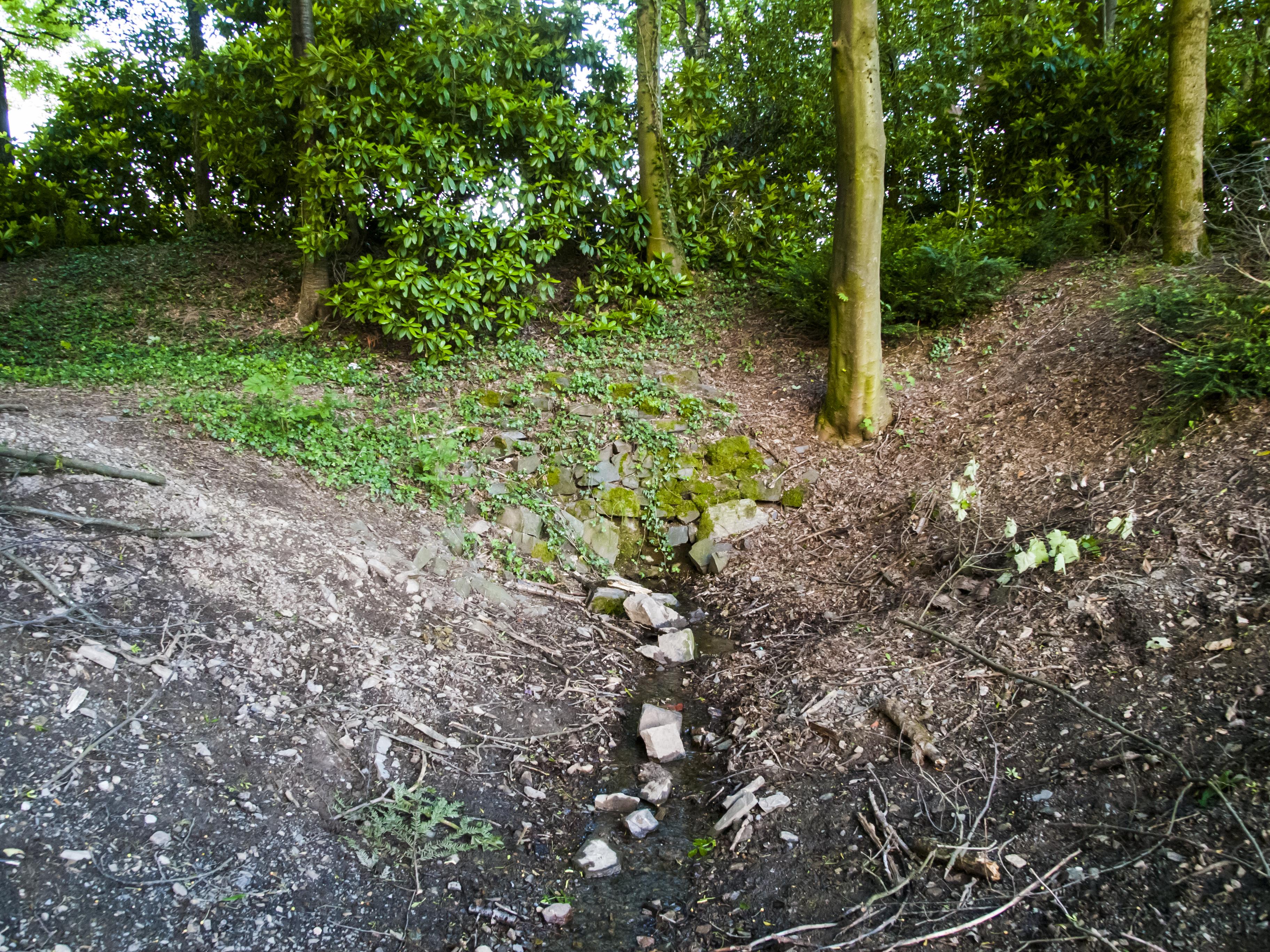 Die Biggequelle im Südosten von Römershagen (Ortsteil von Wenden, Nordrhein-Westfalen); der Quellbereich liegt im Landschaftsschutzgebiet „Wenden-Drolshagen (Typ A)“ und im Naturpark Ebbegebirge